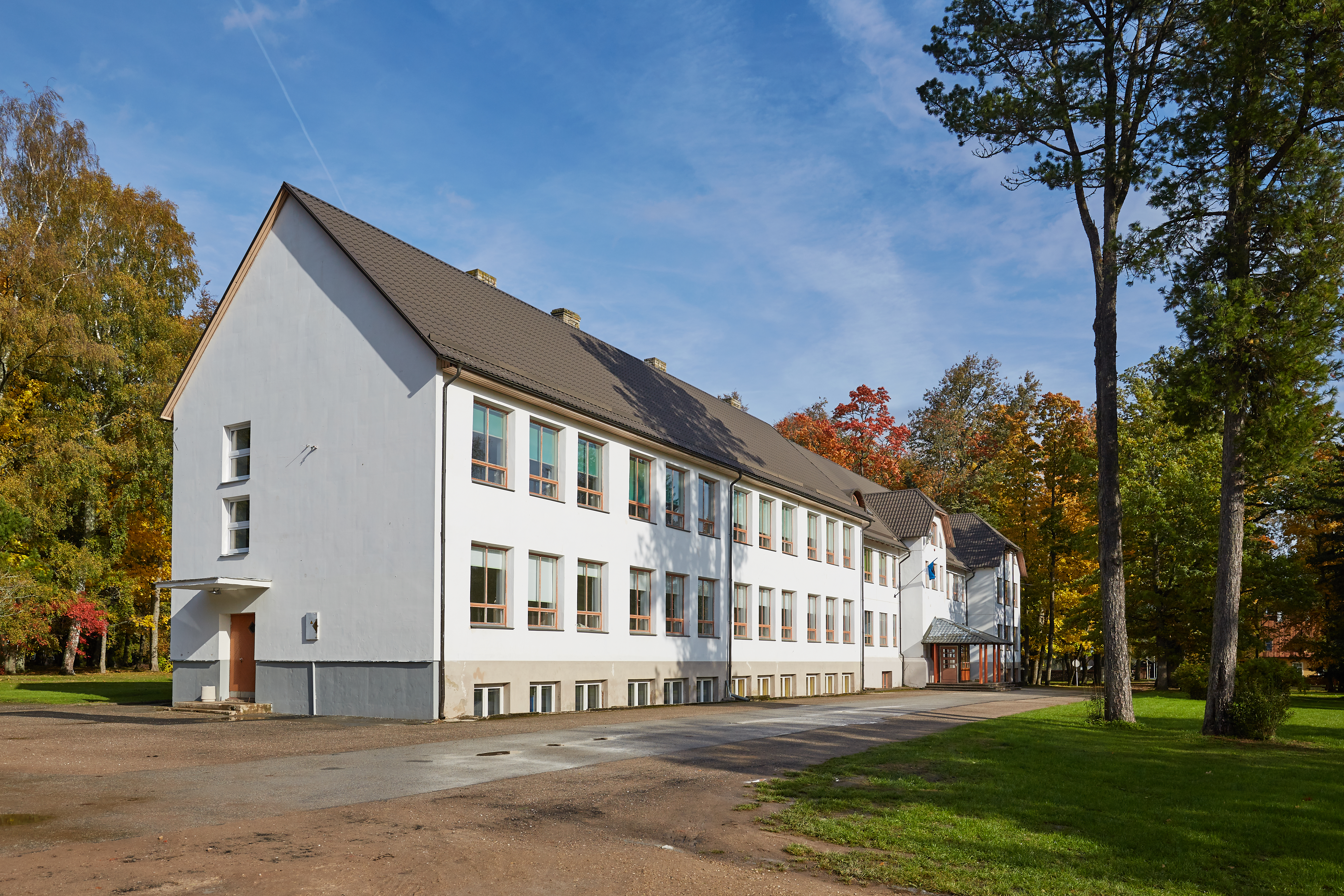 Ahja Kooli hoone 2018. aasta sügisel